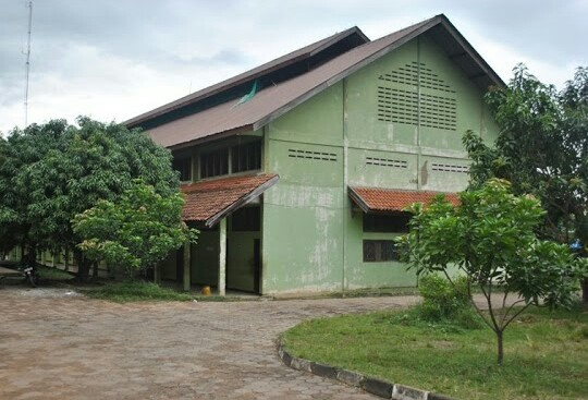 Gedung SMK Negeri 1 Cikampek